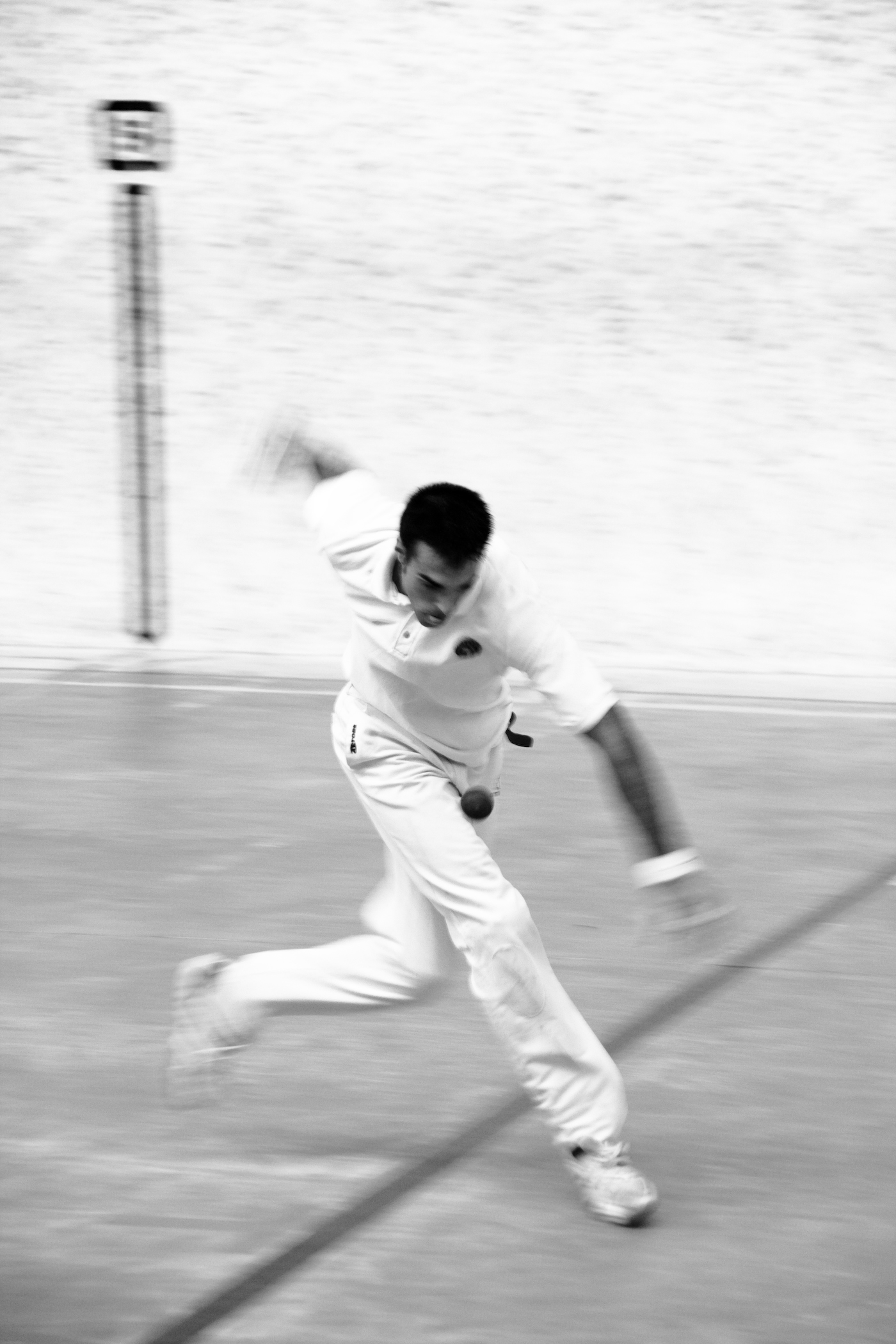 Pelotari en un frontón de La Rioja, España, 2007.